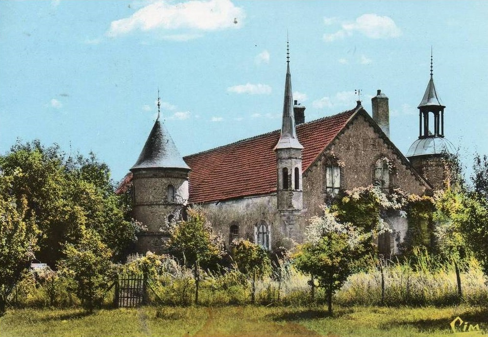 Le château de Sincey-lès-Rouvray.